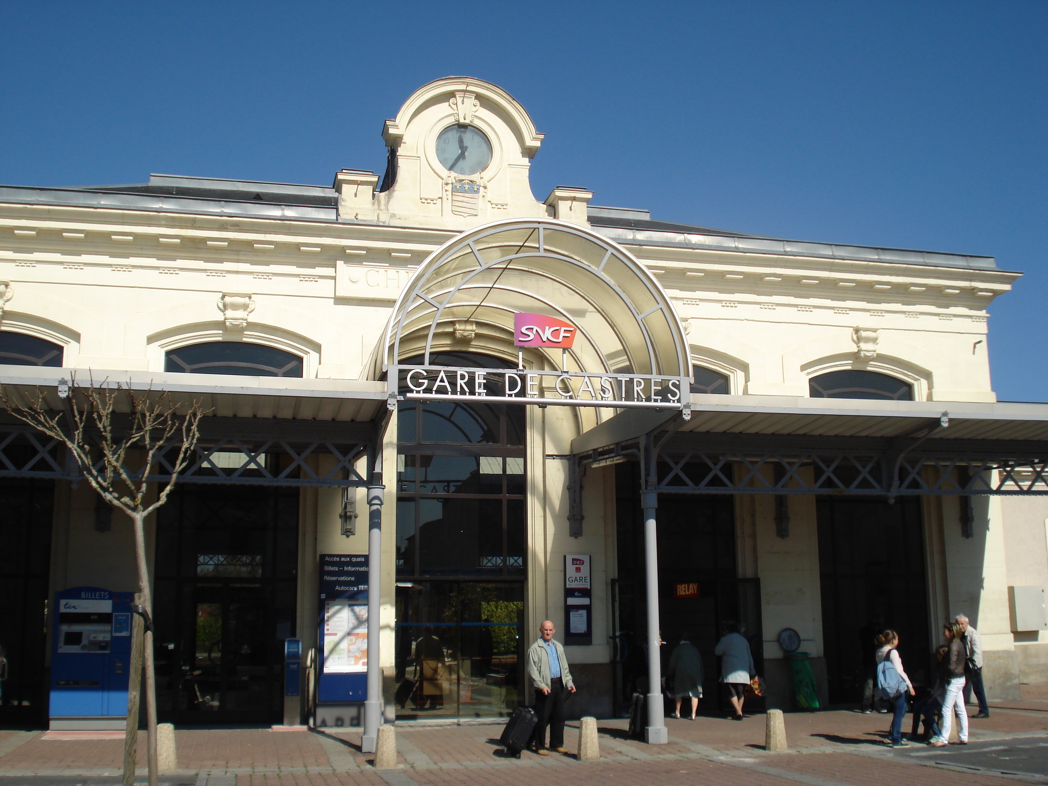 Façade de la gare de Castres.